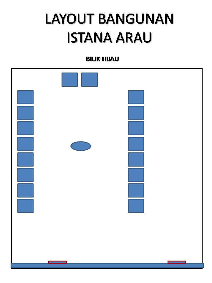 BILIK MENGADAP